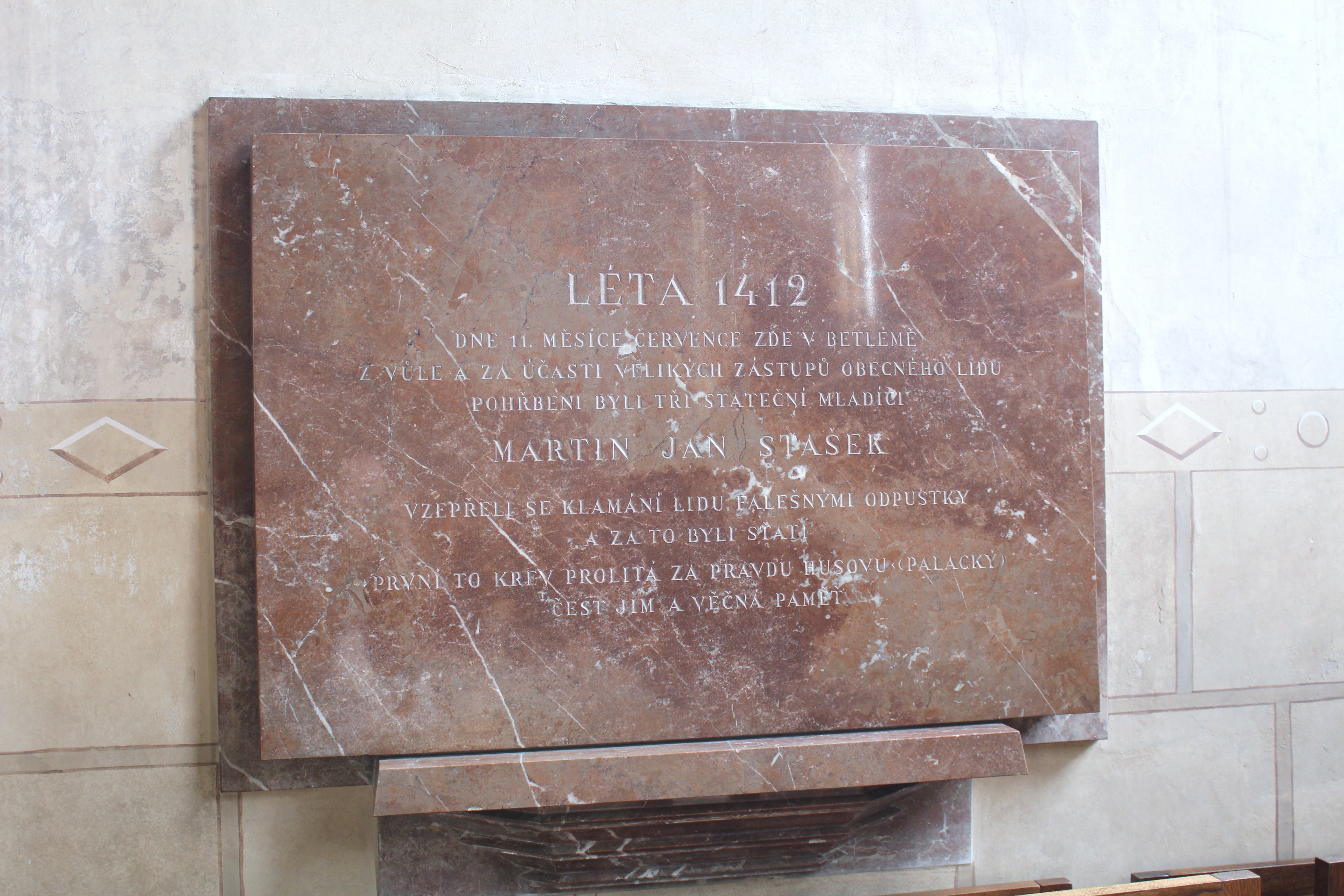 Betlehemskapellet